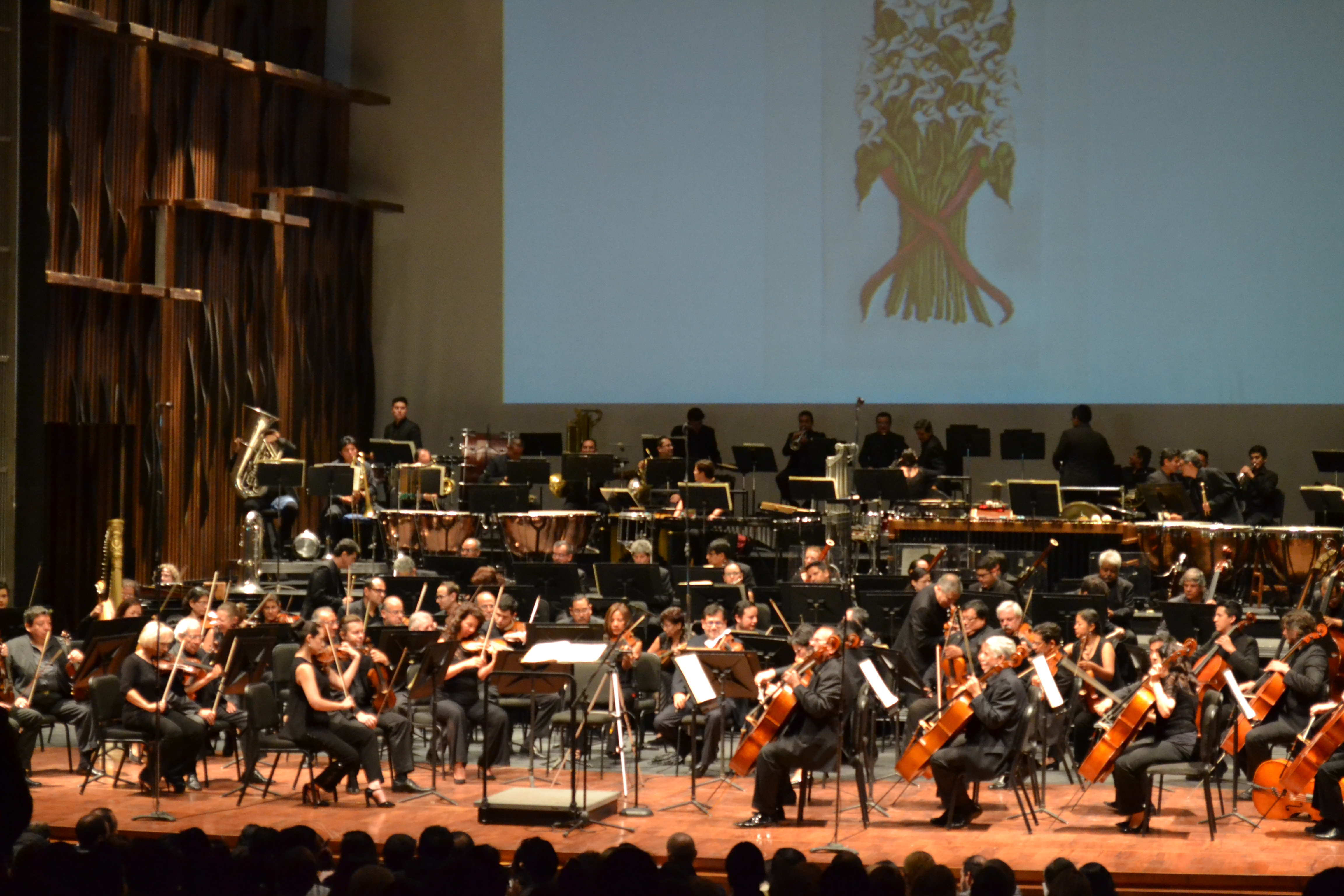 Foto tomada en el Palacio de Bellas Artes.